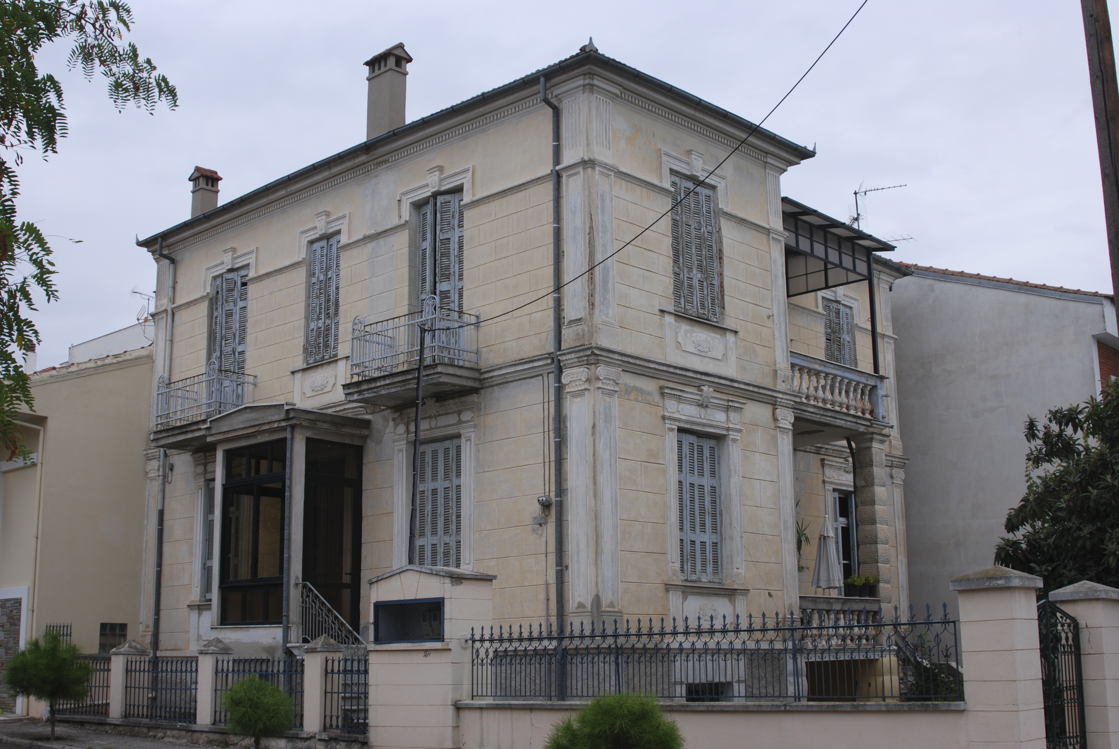 Къща в Драма, Гърция.